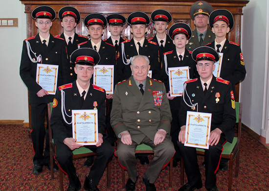 Маршал Советского Союза Дмитрий Тимофеевич Язов с лучшими суворовцами Казанского СВУ